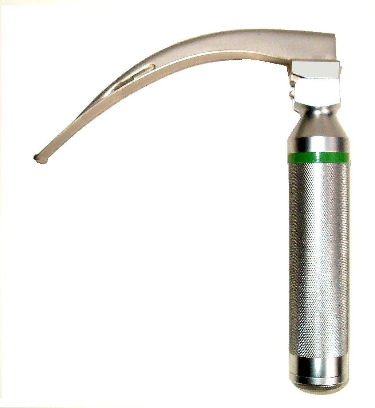 laryngoscoop